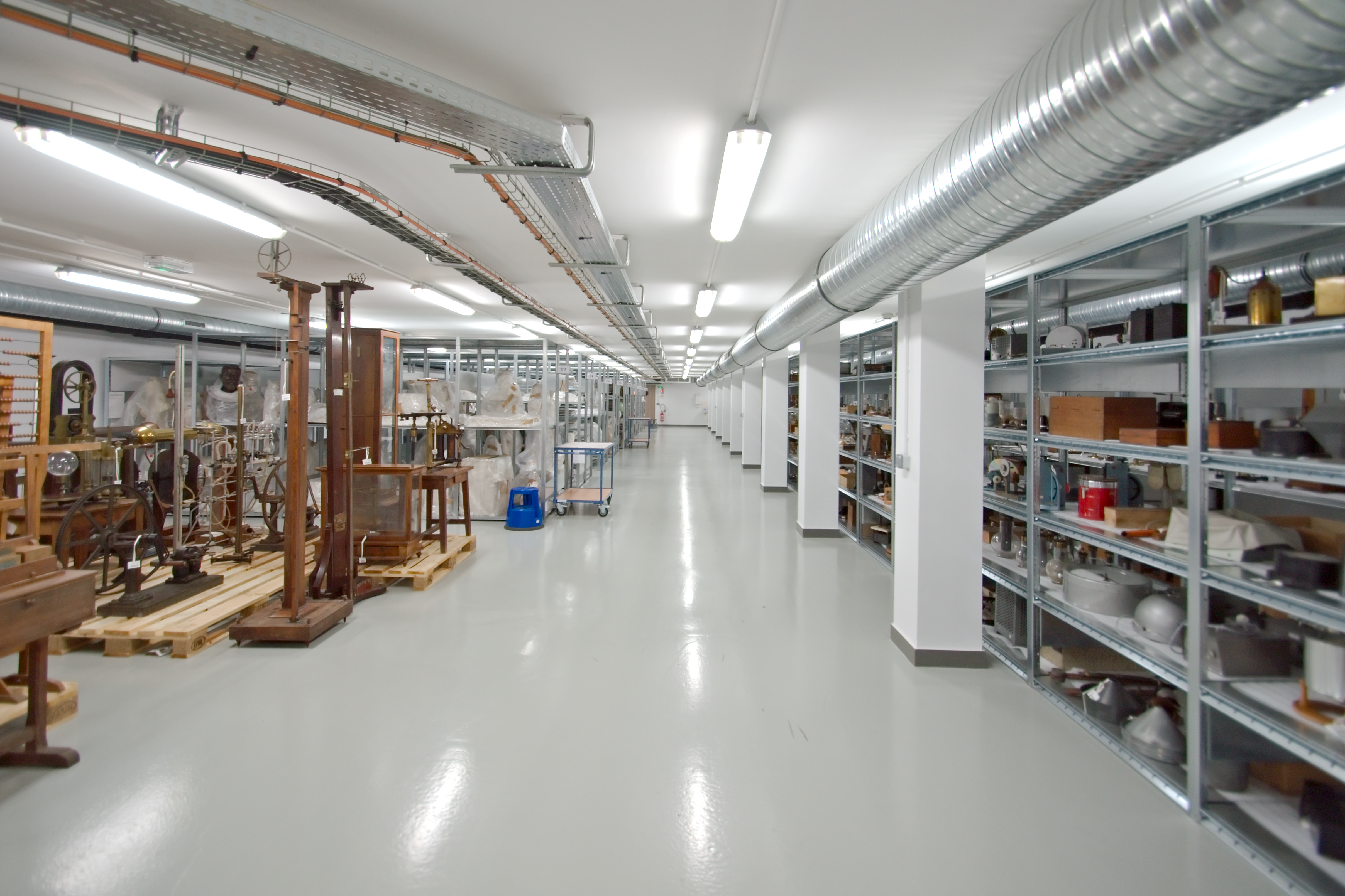 Archives du Musée National de l'Éducation, rue de Bihorel à Rouen